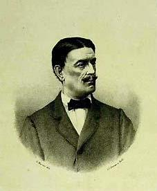 Luigi Pianciani, sindaco di Roma 1870 ca. pubblico dominio